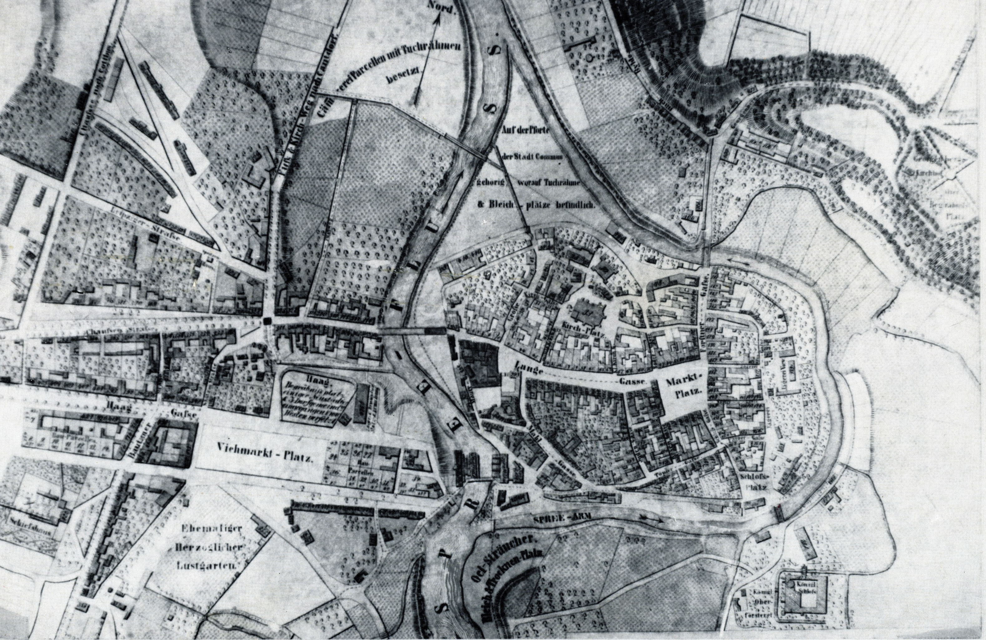 Ansicht Innenstadt Spremberg/Niederlausitz, Brandenburg, Deutschland